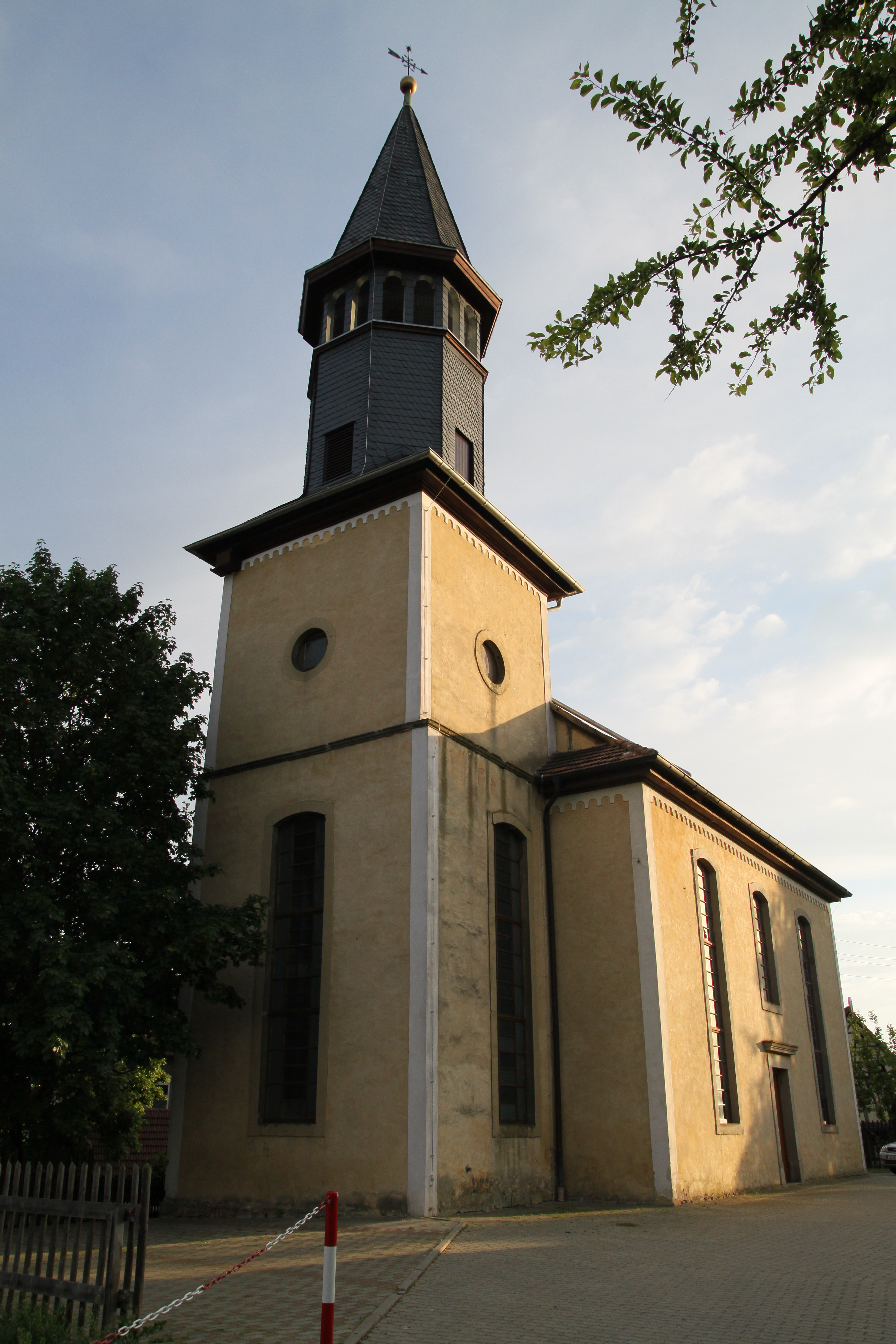 Dorfkirche in Rauschwitz, Nordseite